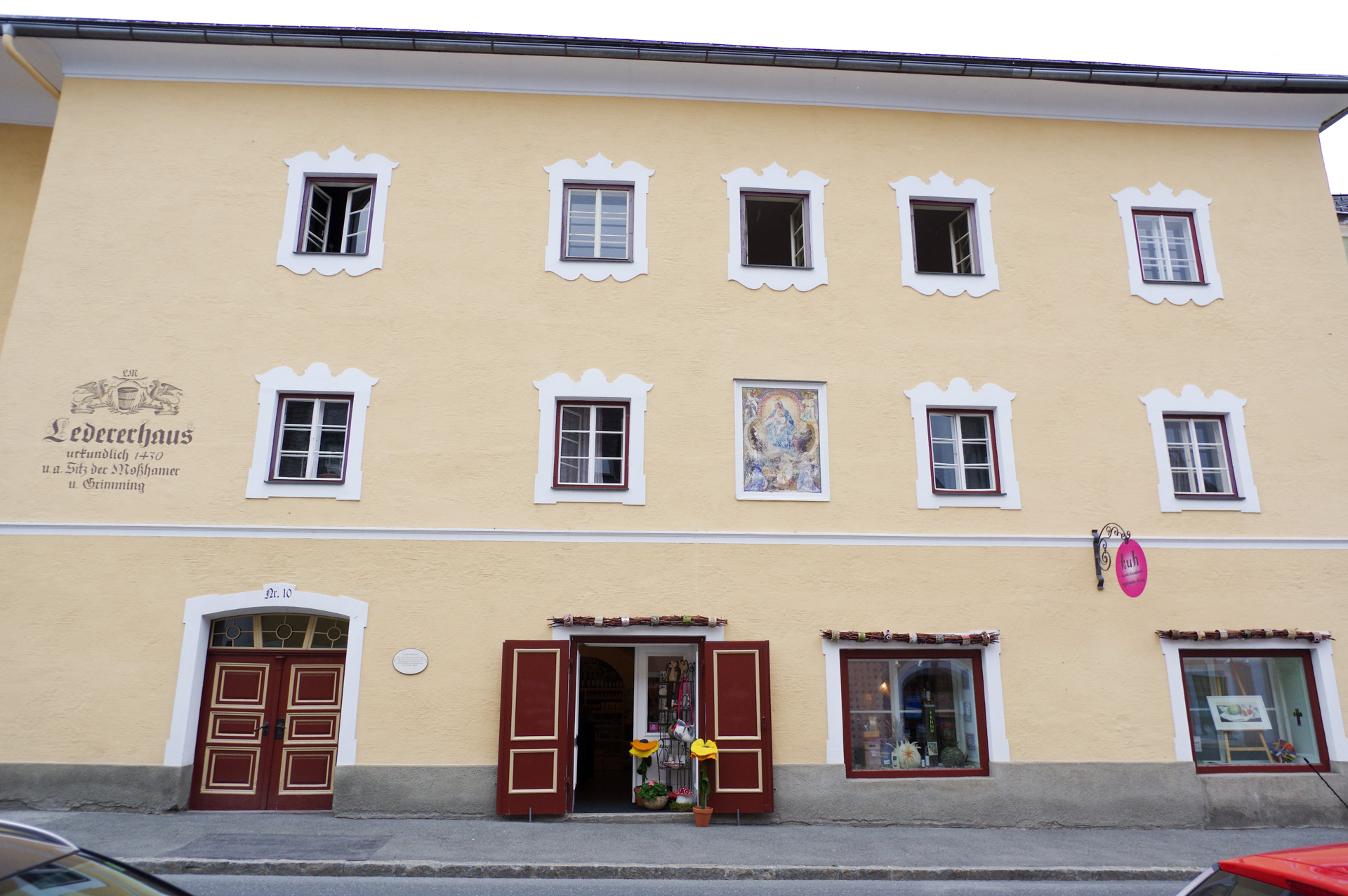 Bürgerhaus, Ledererhaus